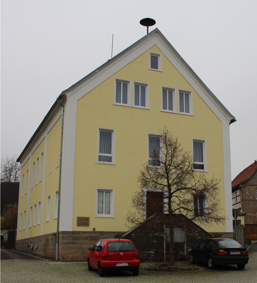 Die ehem. Schule von Büchold in der Dorfmitte